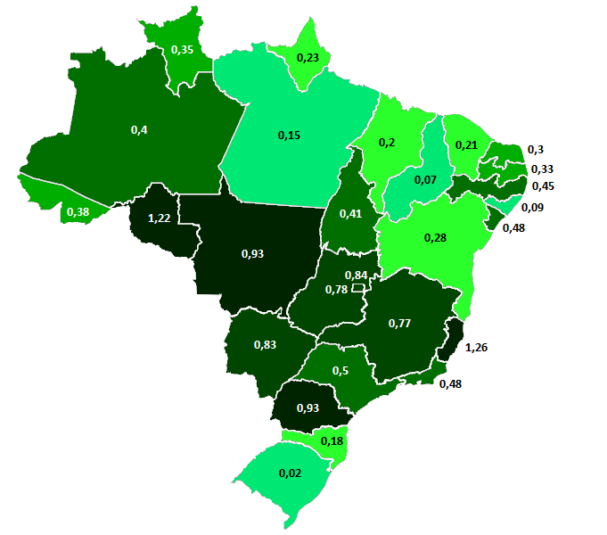 Presbiterianismo no Brasil (2010)